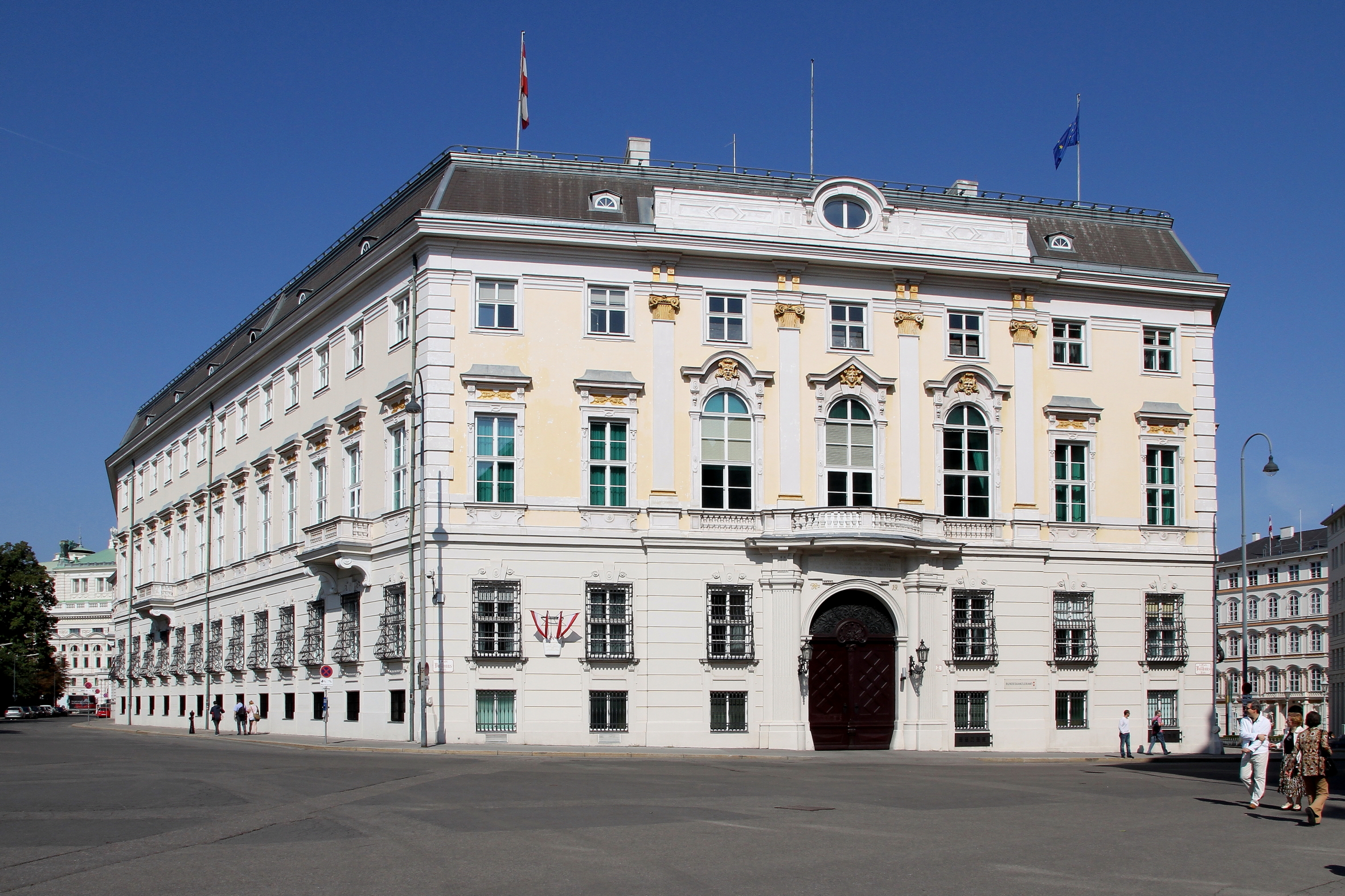 Das österreichische Bundeskanzleramt, Ballhausplatz 2, 1010 Wien.